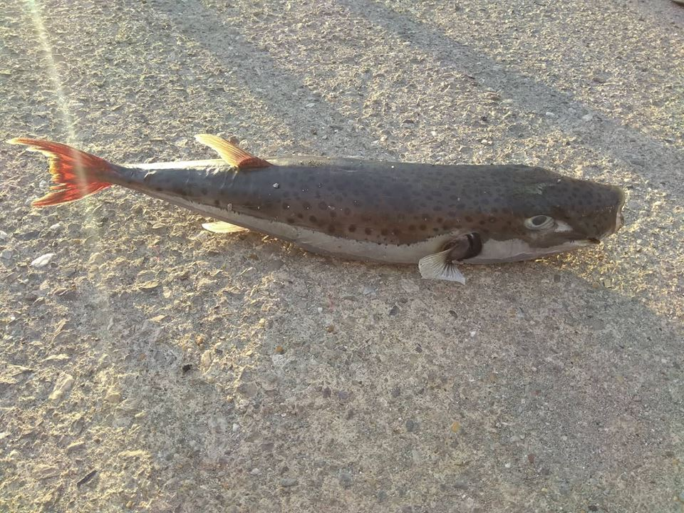 Λαγοκέφαλος αλιευμένος ανοικτά της Κορώνης (5 Αυγούστου 2018)